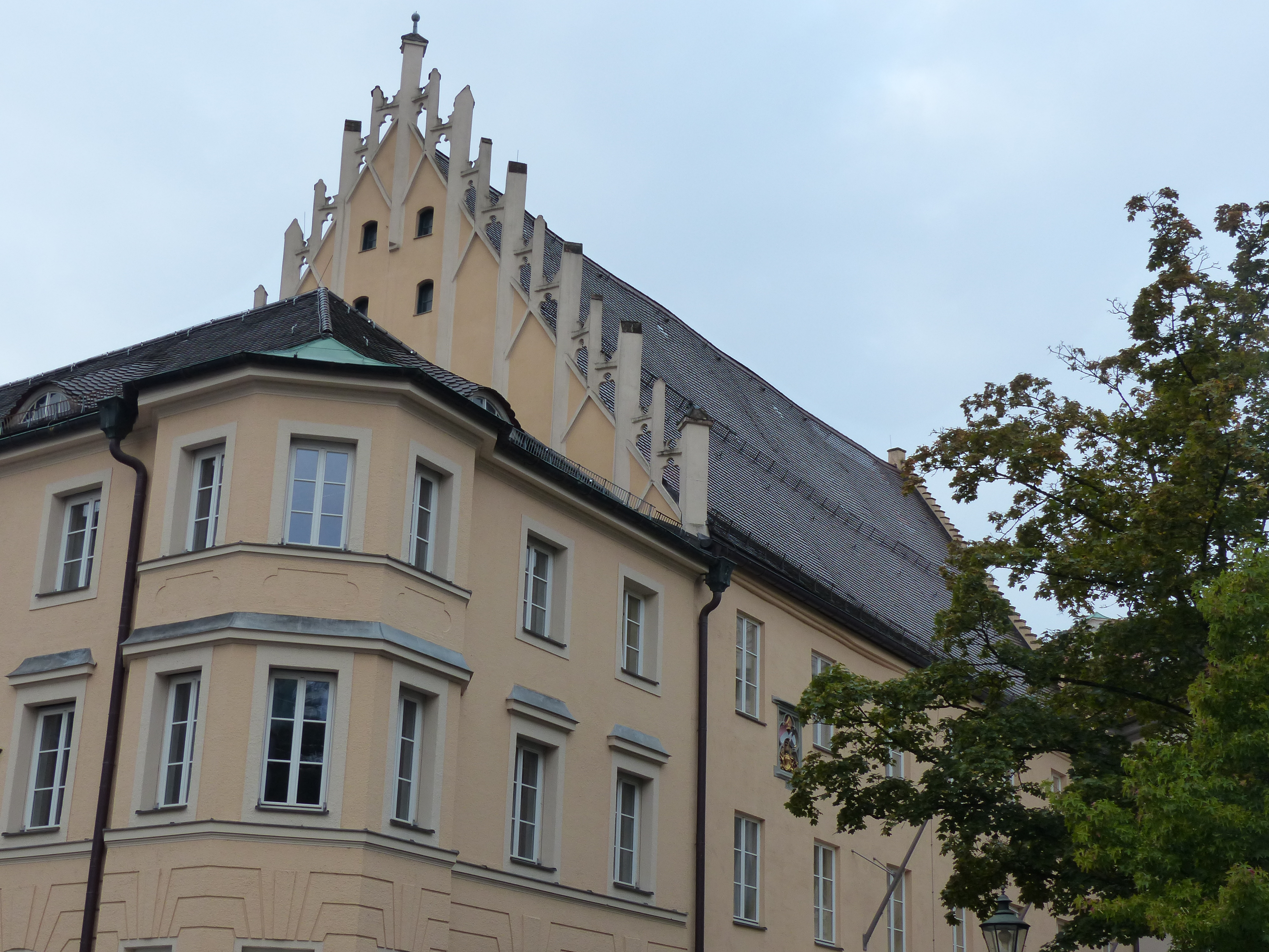 Ehem. fürstbischöfliches Kastenamt in Augsburg, 1492, nach Westen Stufengiebel, Giebel nach Osten mit Vorlagen und Fialen geschmückt, Wappenstein mit Maßwerkrahmen; westlich anschließend barockisierender Walmdachbau um 1920